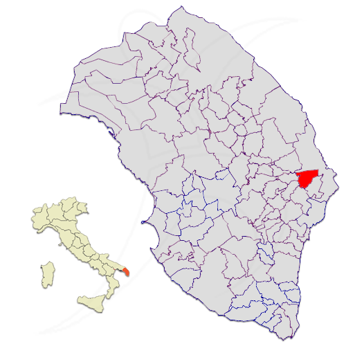 Il comune di Giurdignano nella provincia di Lecce